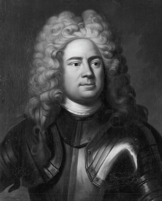 Bildnis von Oberst Christoph Ludwig Motz (1665-1742), Kommandant von Bremen